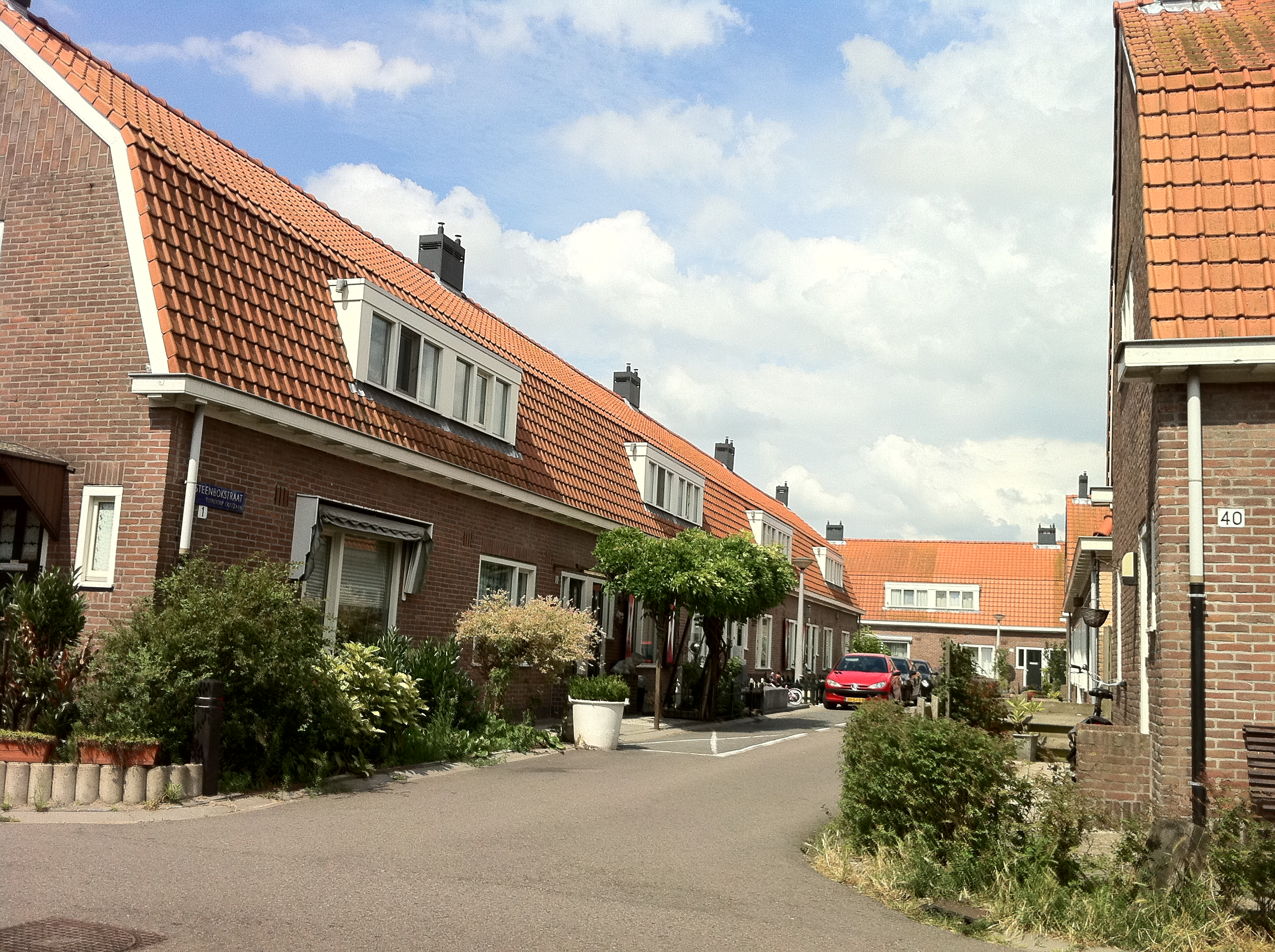 Tuindorp Oostzaan Amsterdam-Noord juli 2011